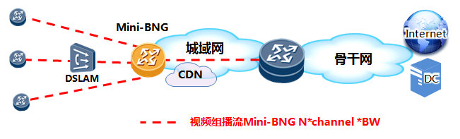 smart CO